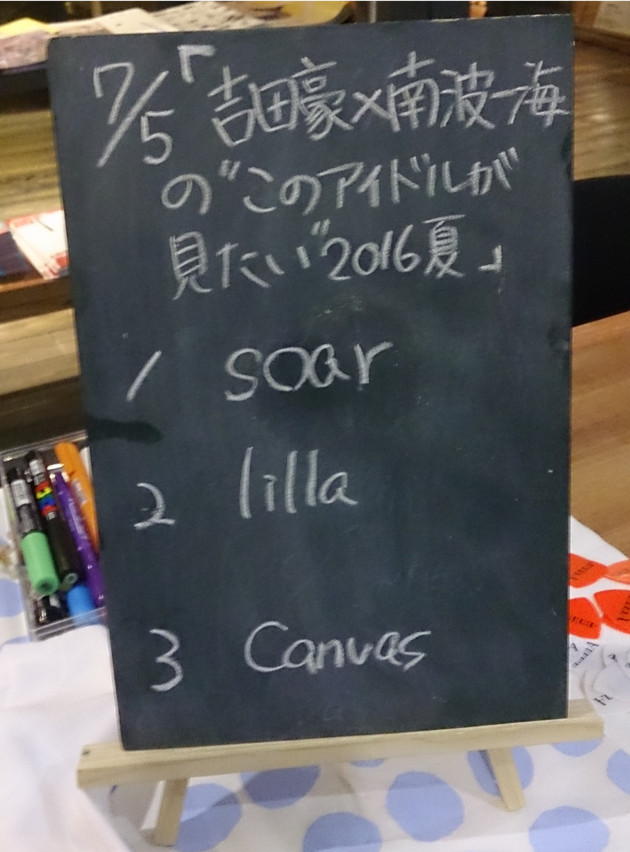 amiinAセトリボード(20160705(1))